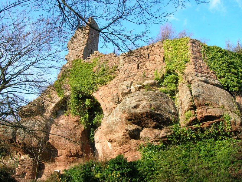 Le château du Guirbaden